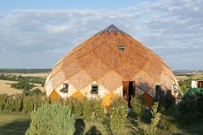 Zome d'habitation et de soin en bois situé près d'Agen